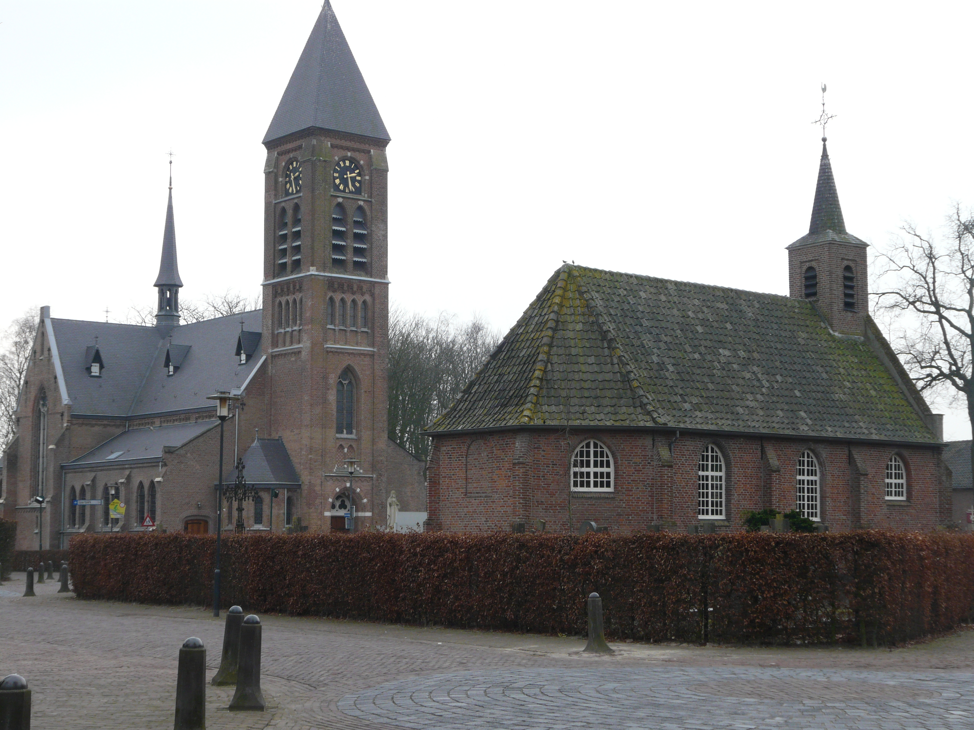 Molenschot